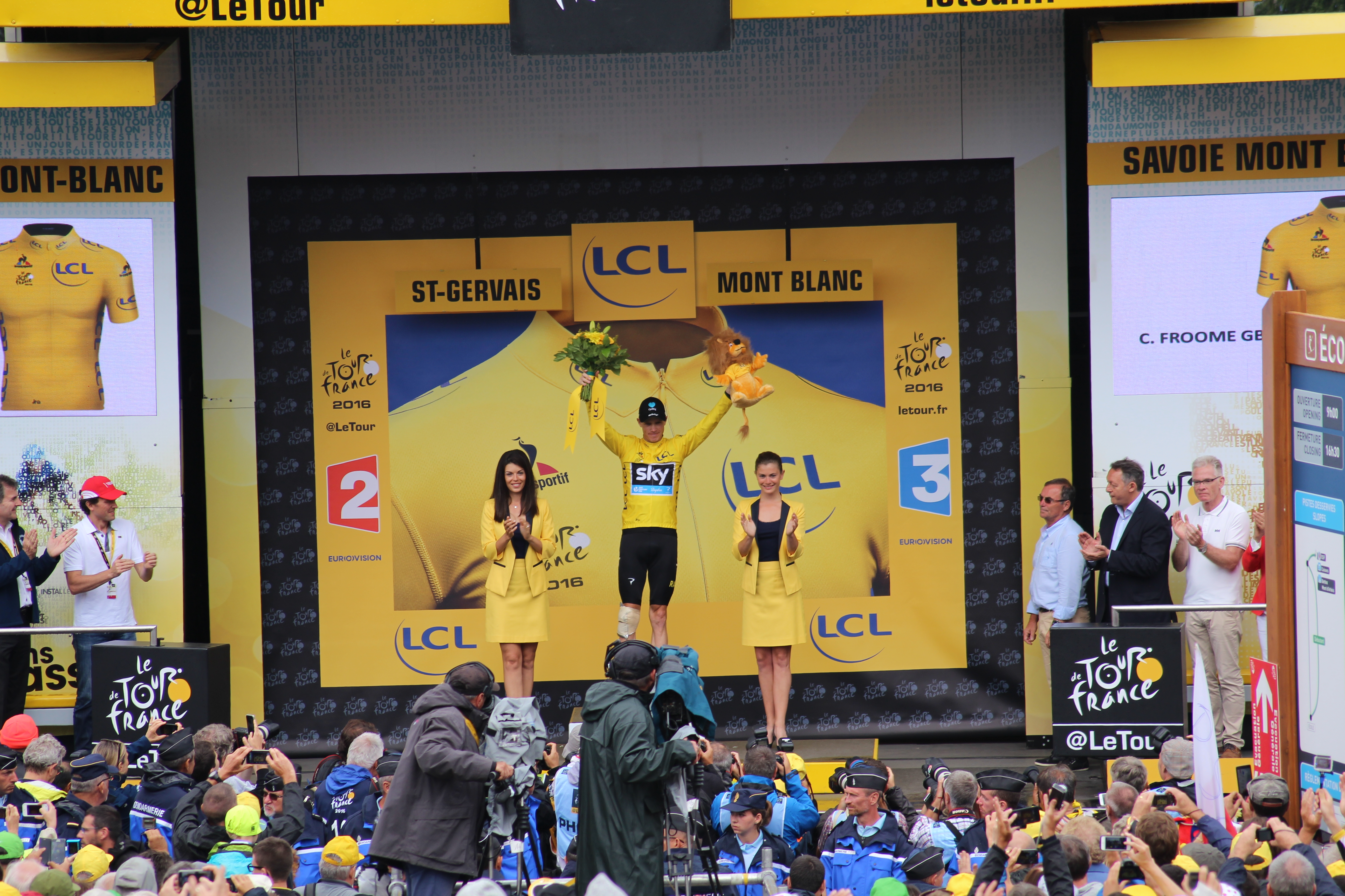 FOOOOOMMMEEEEEE